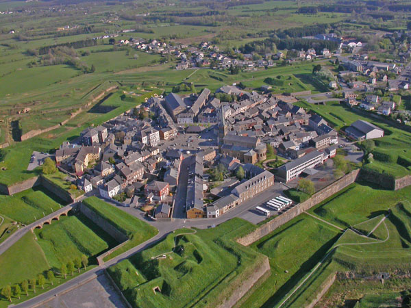 Rocroi vu du ciel. This building is en partie classé, en partie inscrit au titre des Monuments Historiques. .